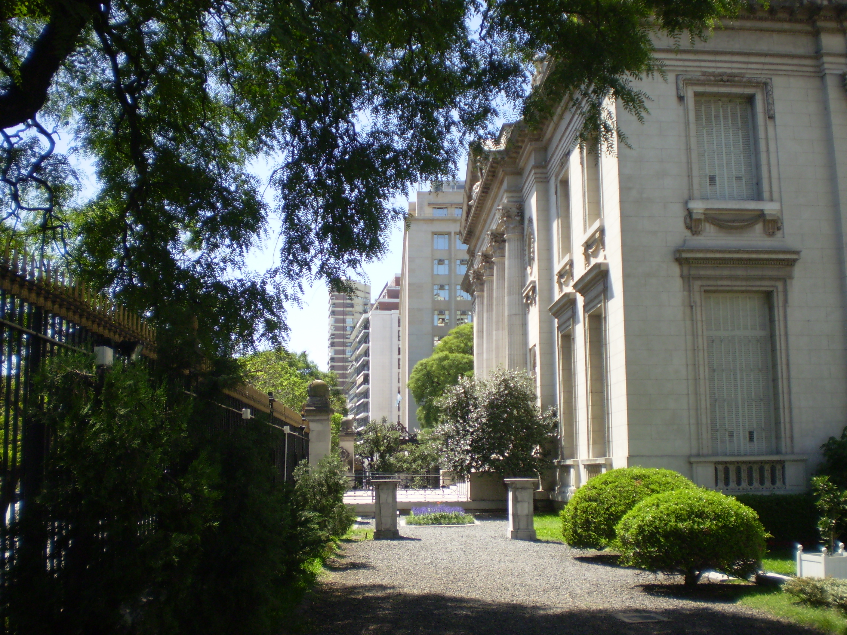 Museo Nacional de Arte Decorativo, Buenos Aires, Argentina